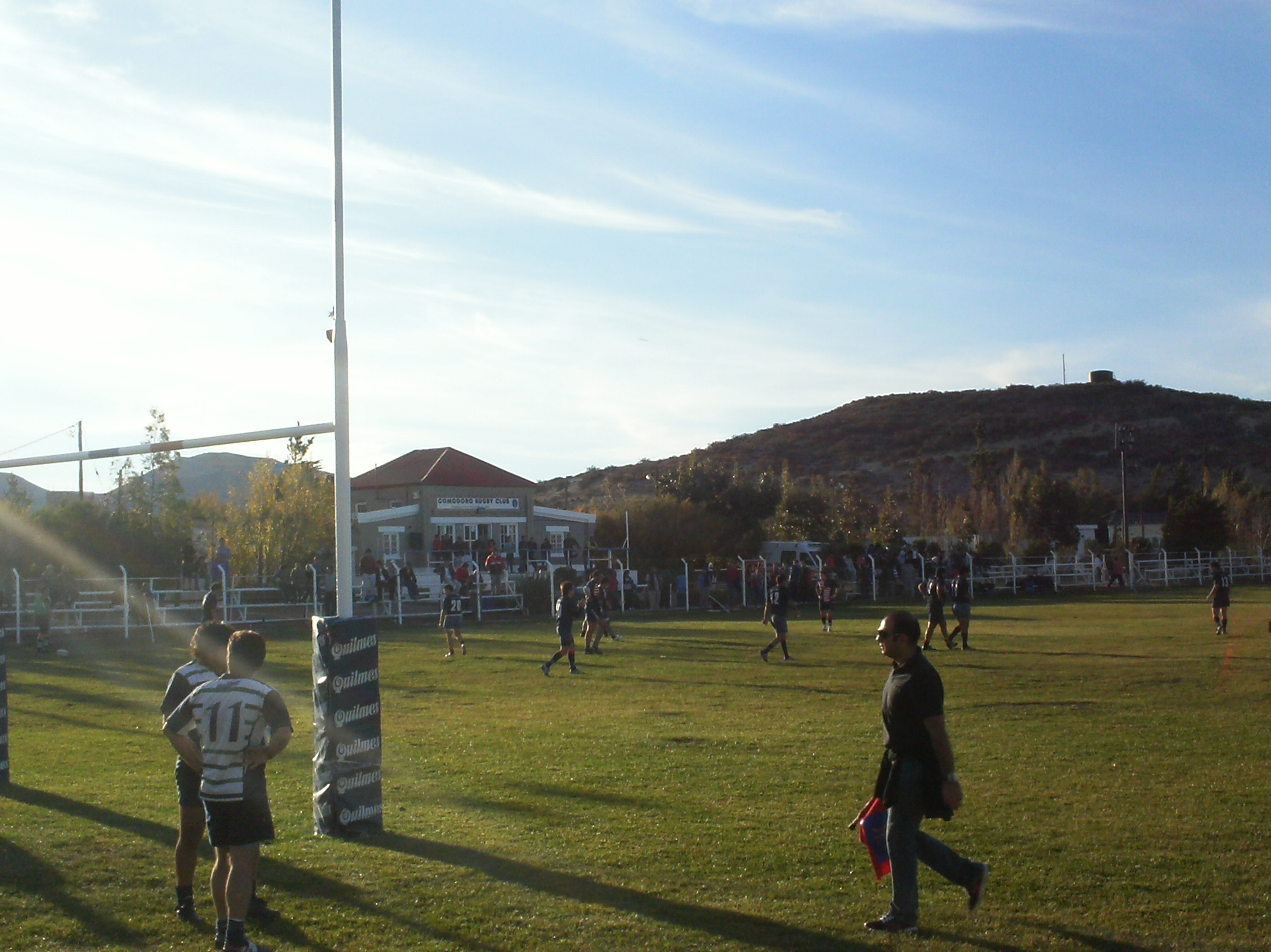 EL ESTADIO DE RUGBIE DE COMODORO